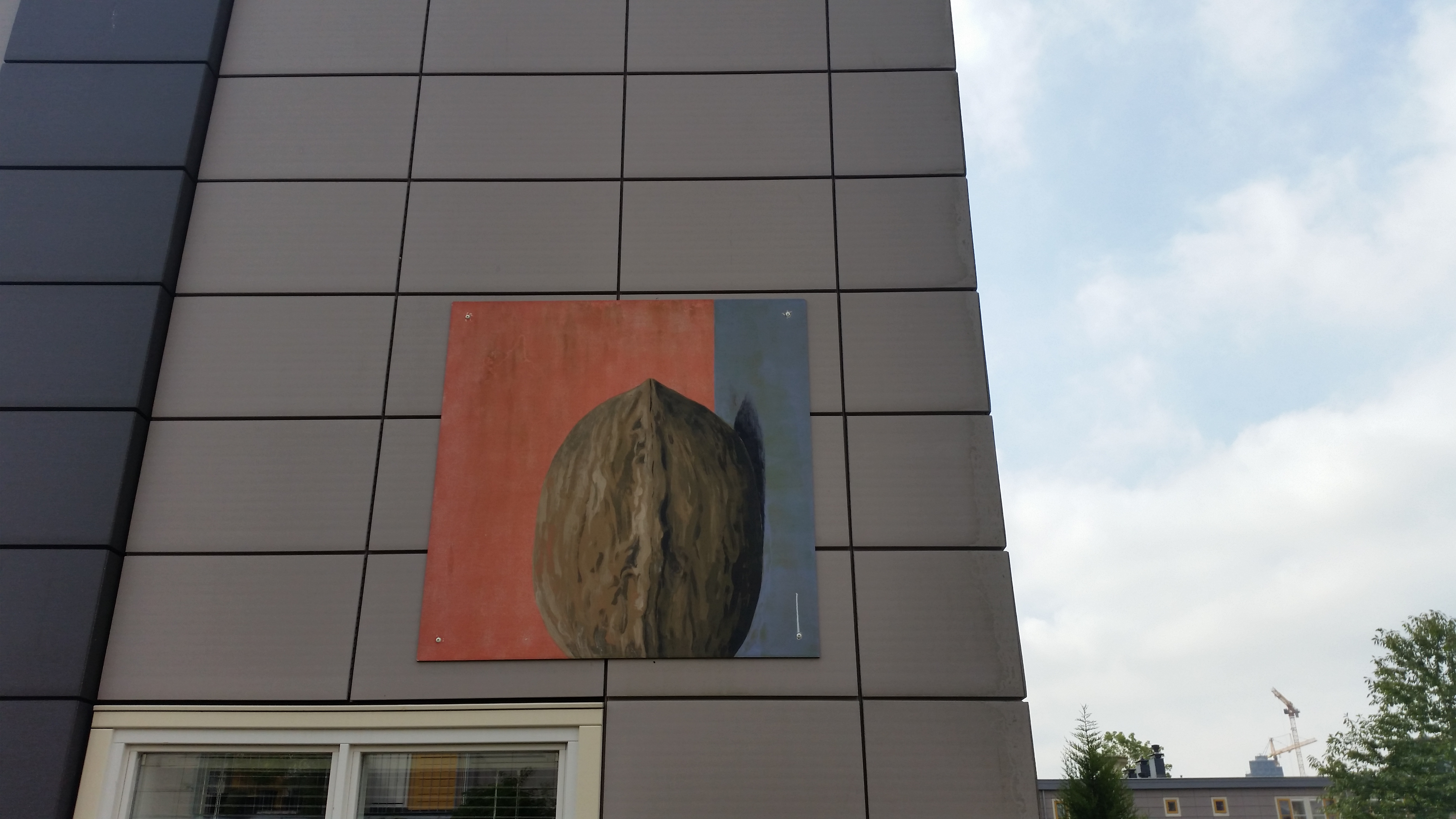 Kunstwerk, kunstenaar onbekend, Tuindorp Oostzaan, Tuttifruttidorp, Notenstraat